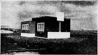 J.J.P. Oud (architect). Directiekeet, Oud-Mathenesse, Rotterdam. 1923. Foto afkomstig uit Bouwkundig Weekblad, 44e jaargang, nummer 36 (8 september 1923): p. 386.